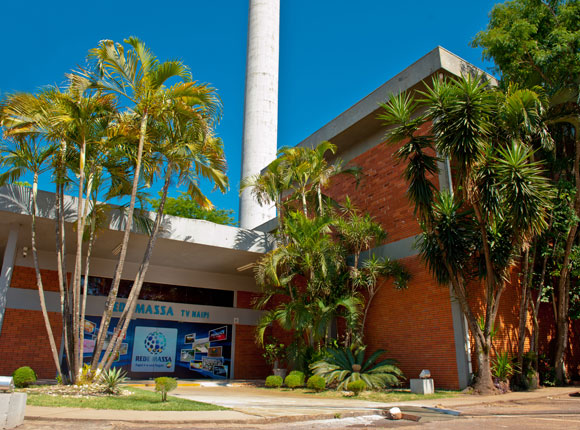 Sede TV Naipi Rede Massa.